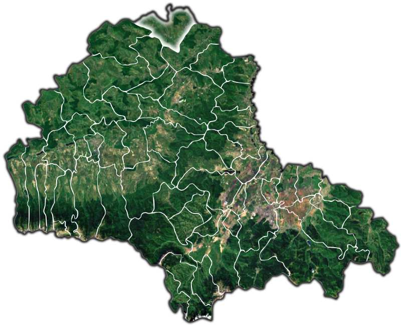 Cata jud Brasov